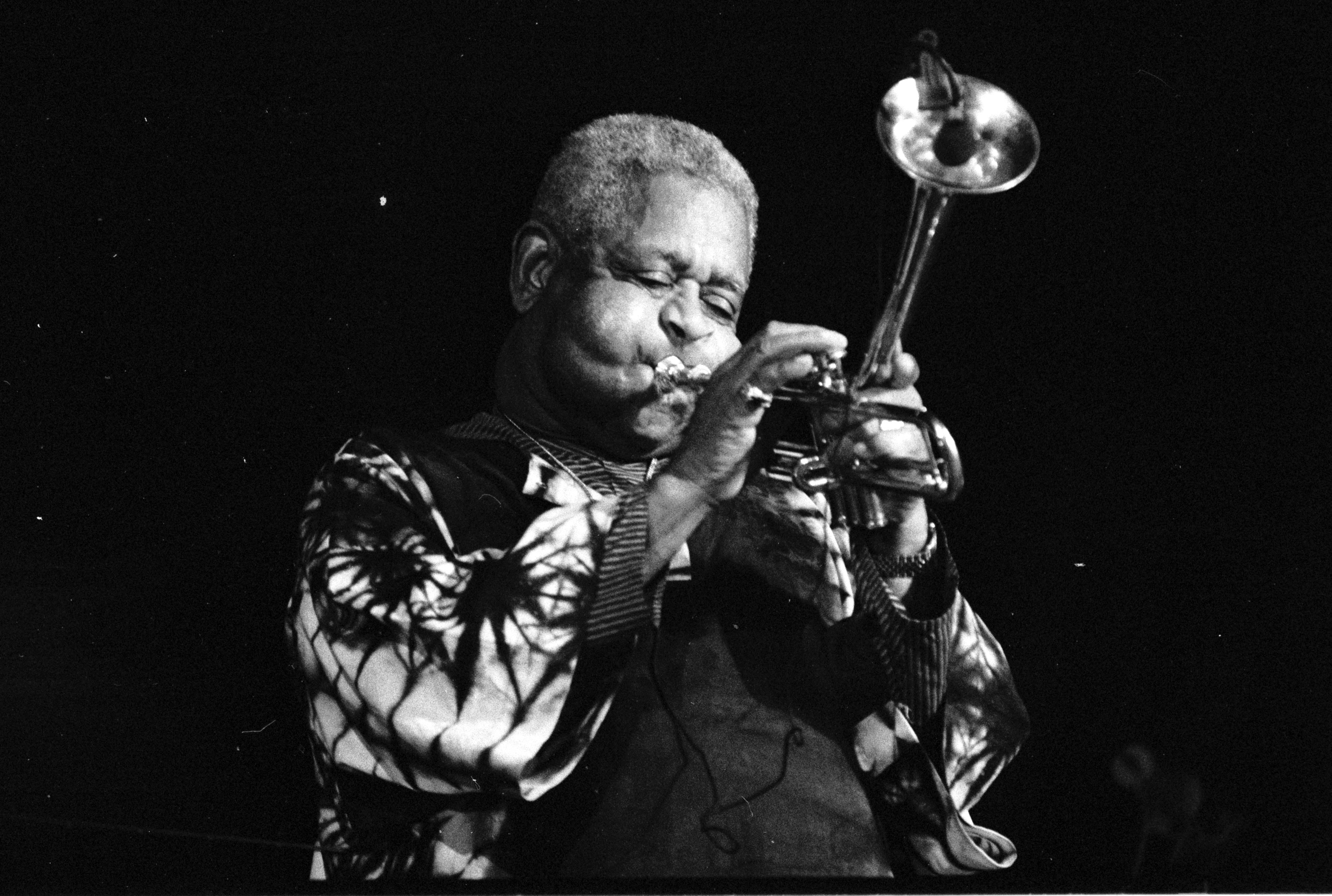 Le trompettiste américain de jazz Dizzy Gillespie en concert à Deauville (Normandie, France) le 20 juillet 1991.